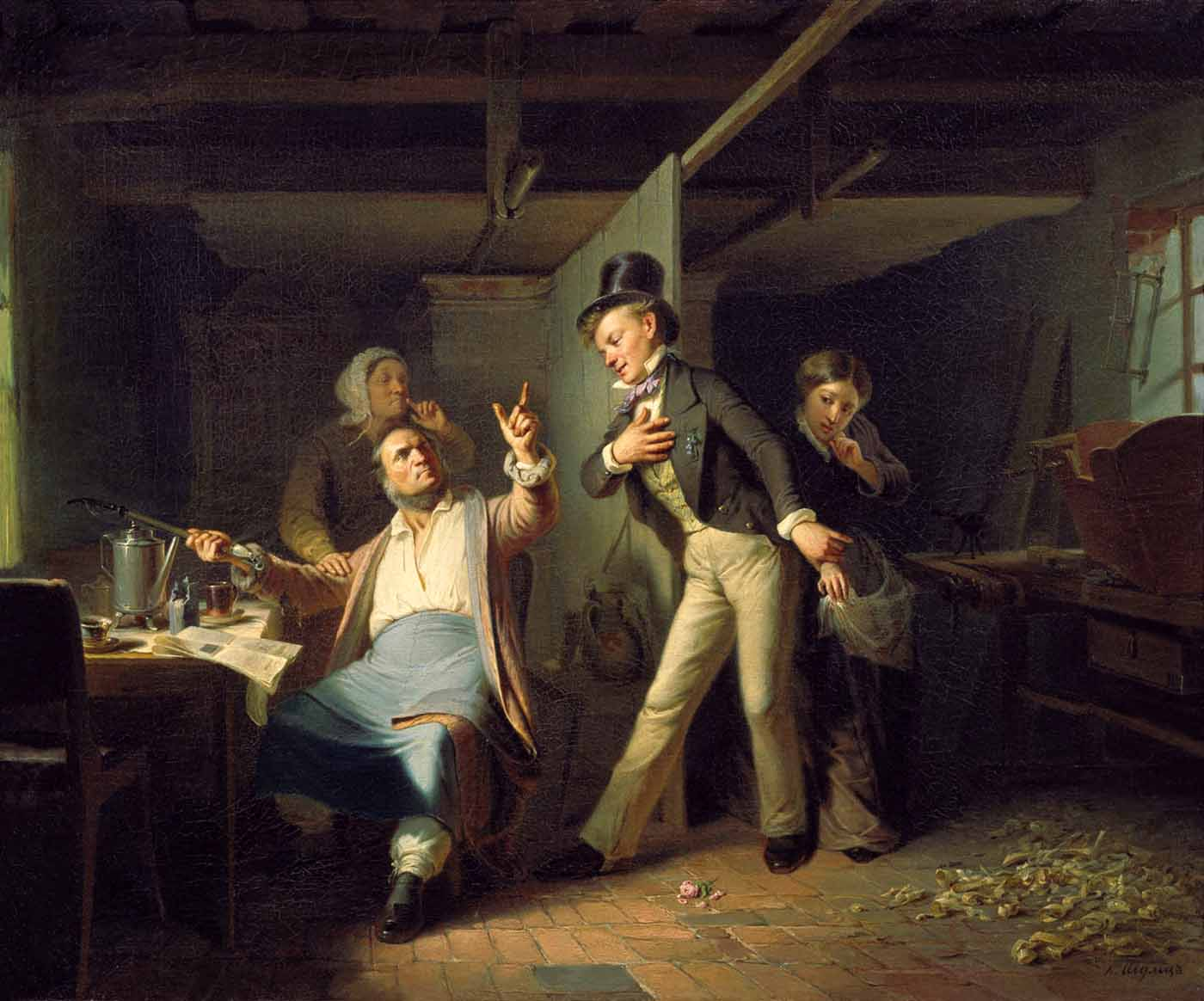 описание = Подмастерье-столяр просит руки дочери своего мастера. время создания = 1856 автор = Карл Карлович Шульц